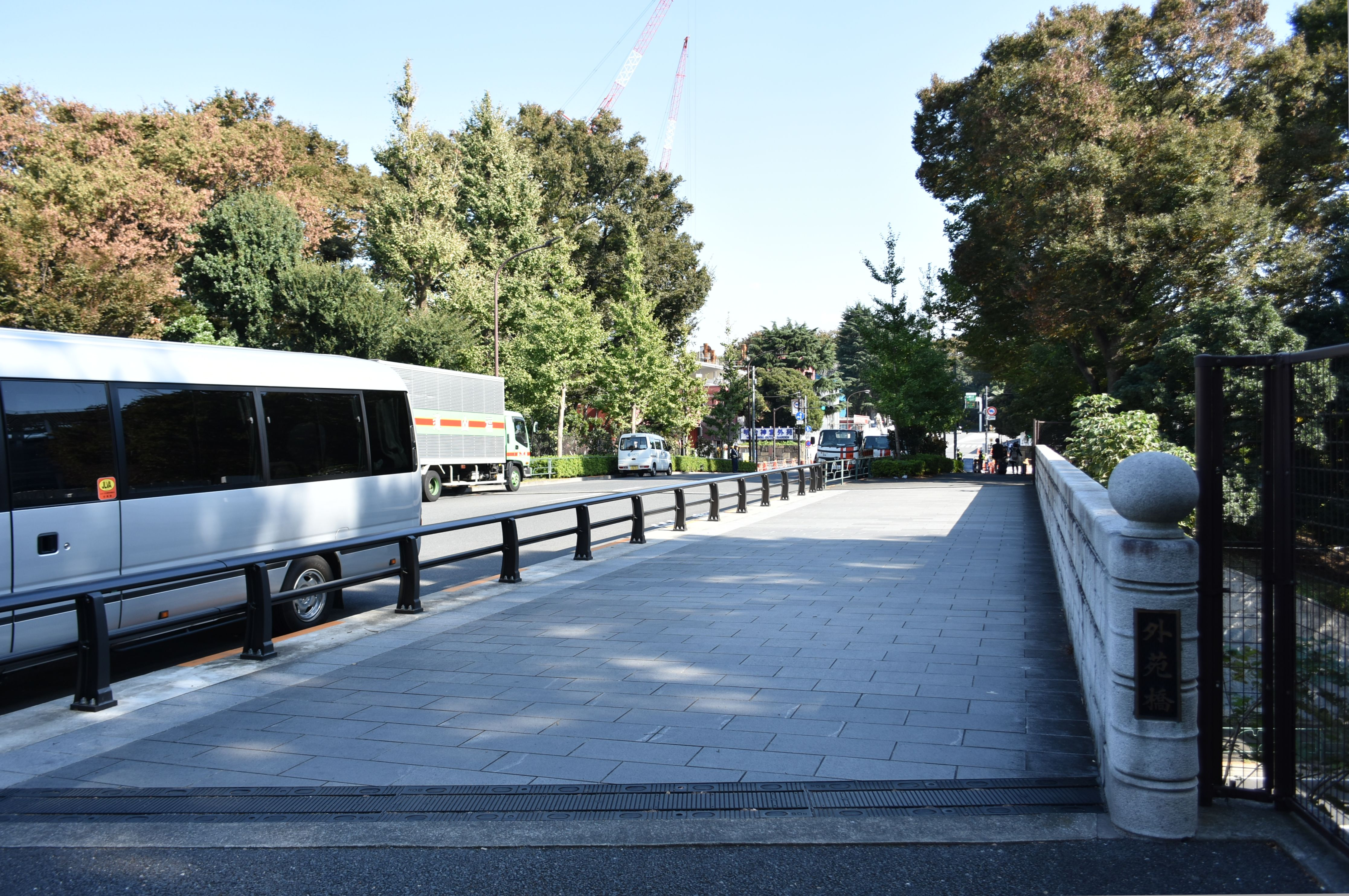 千駄ヶ谷 外苑橋